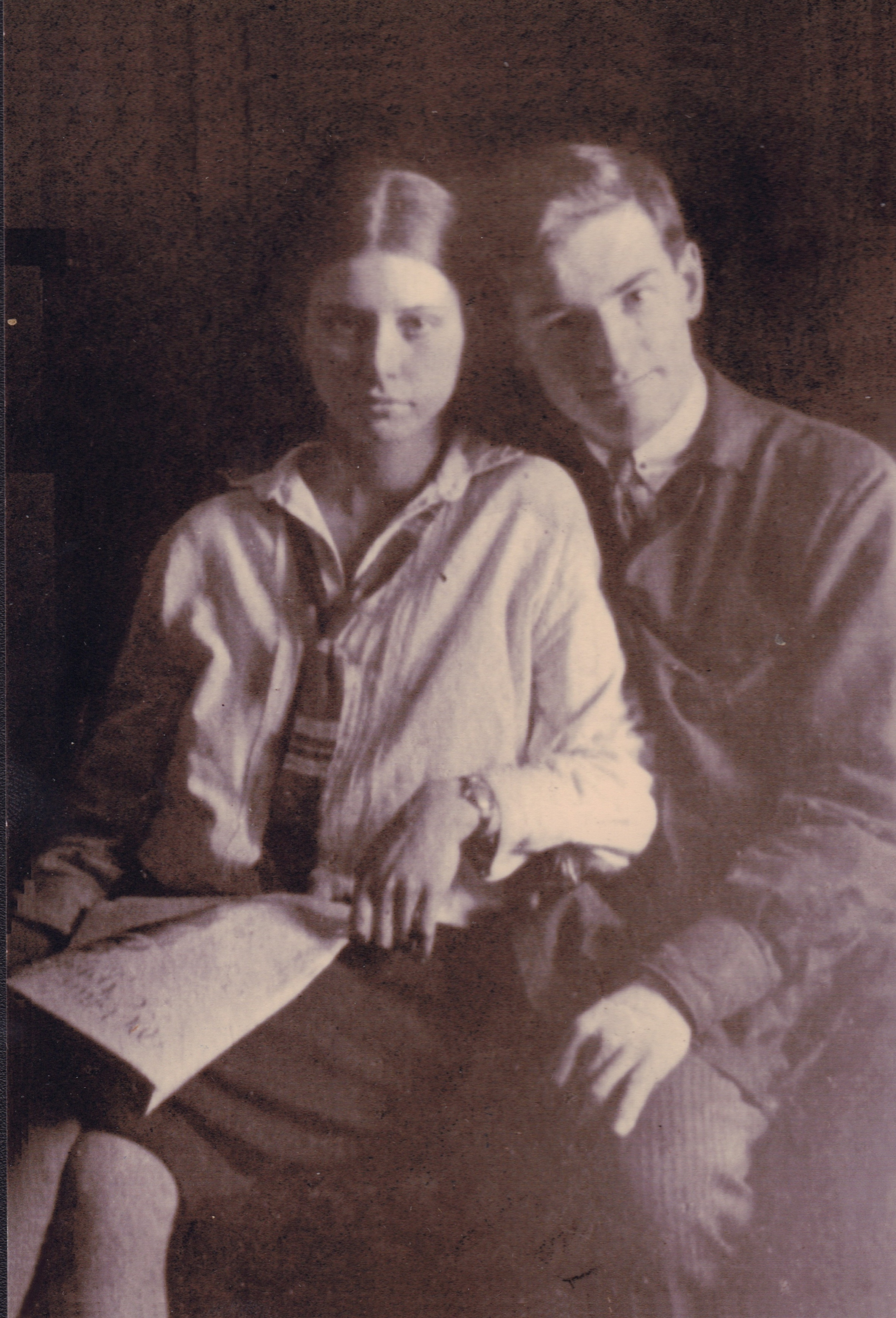 Фотокопия с оригинала. Музей архитектуры и дизайна УрГАХУ, Екатеринбург